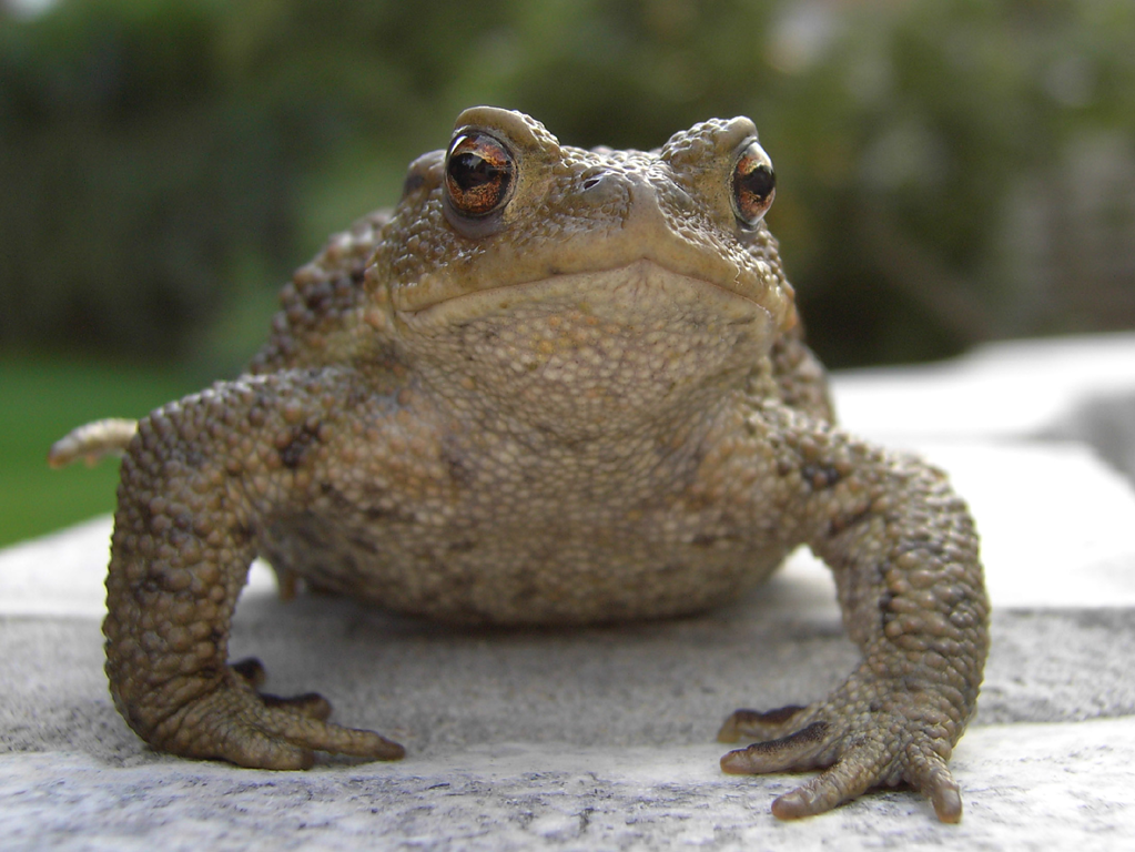 Vorderansicht Erdkröte